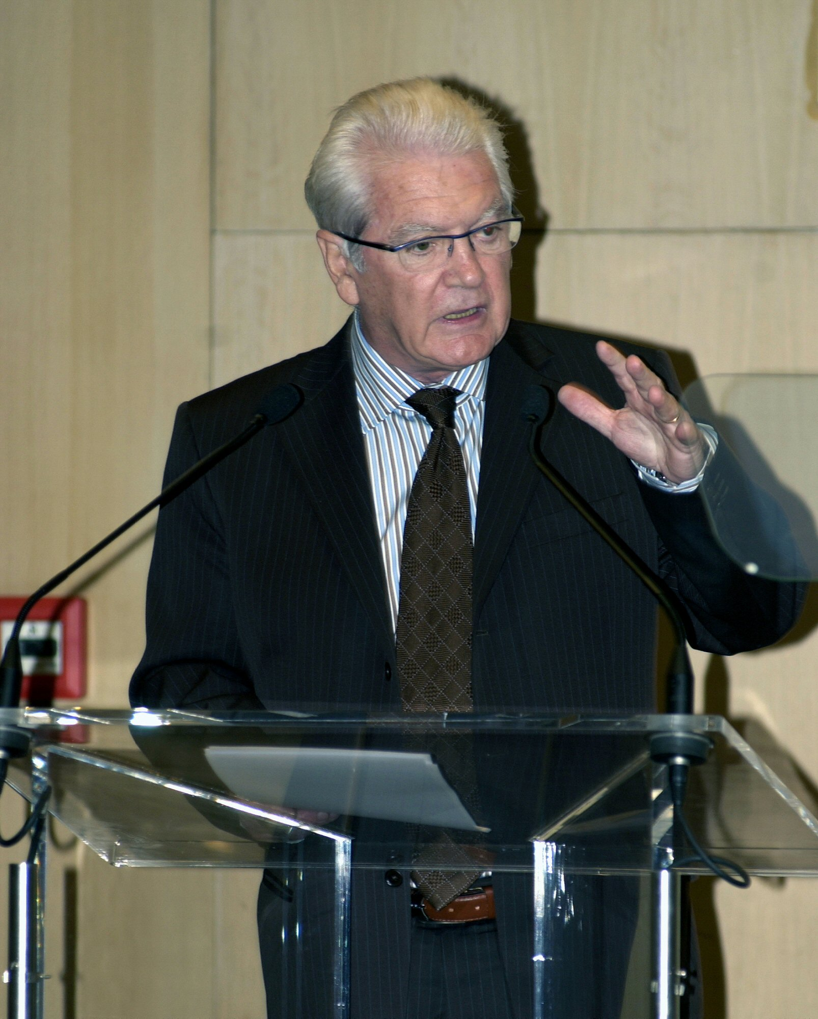 Le Président du Conseil général de la Gironde, Philippe Madrelle